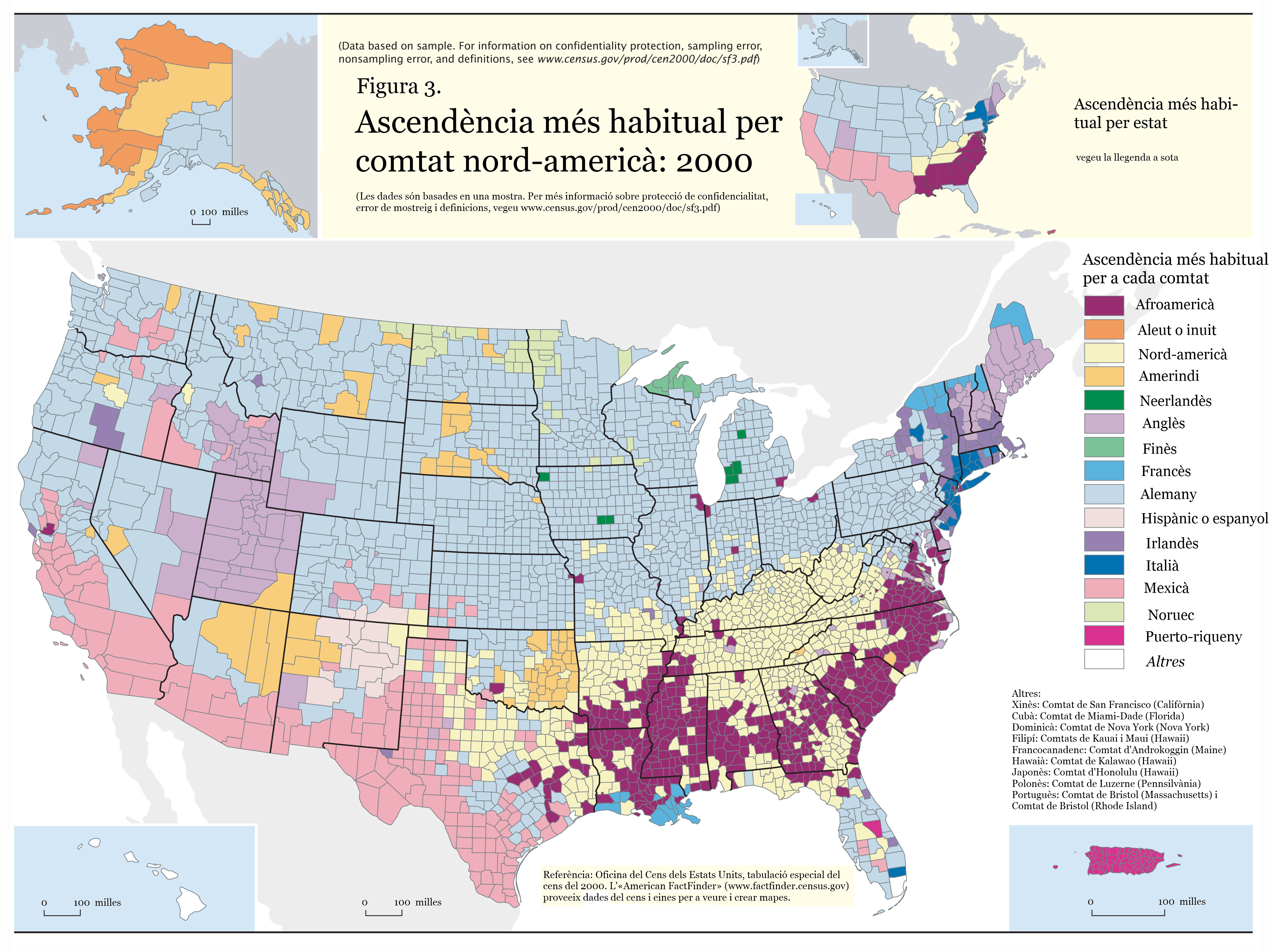 Mapa dels més de 3.000 comtats nord-americans indicant d'on provenen originàriament la majoria de la població del comtat.